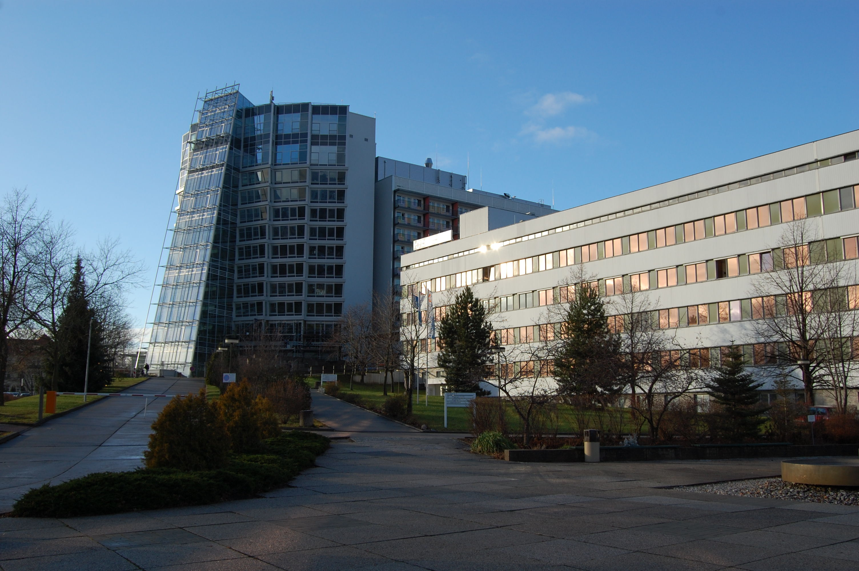 Klinikum Chemnitz, Klinikkomplex Flemmingstraße 2/4